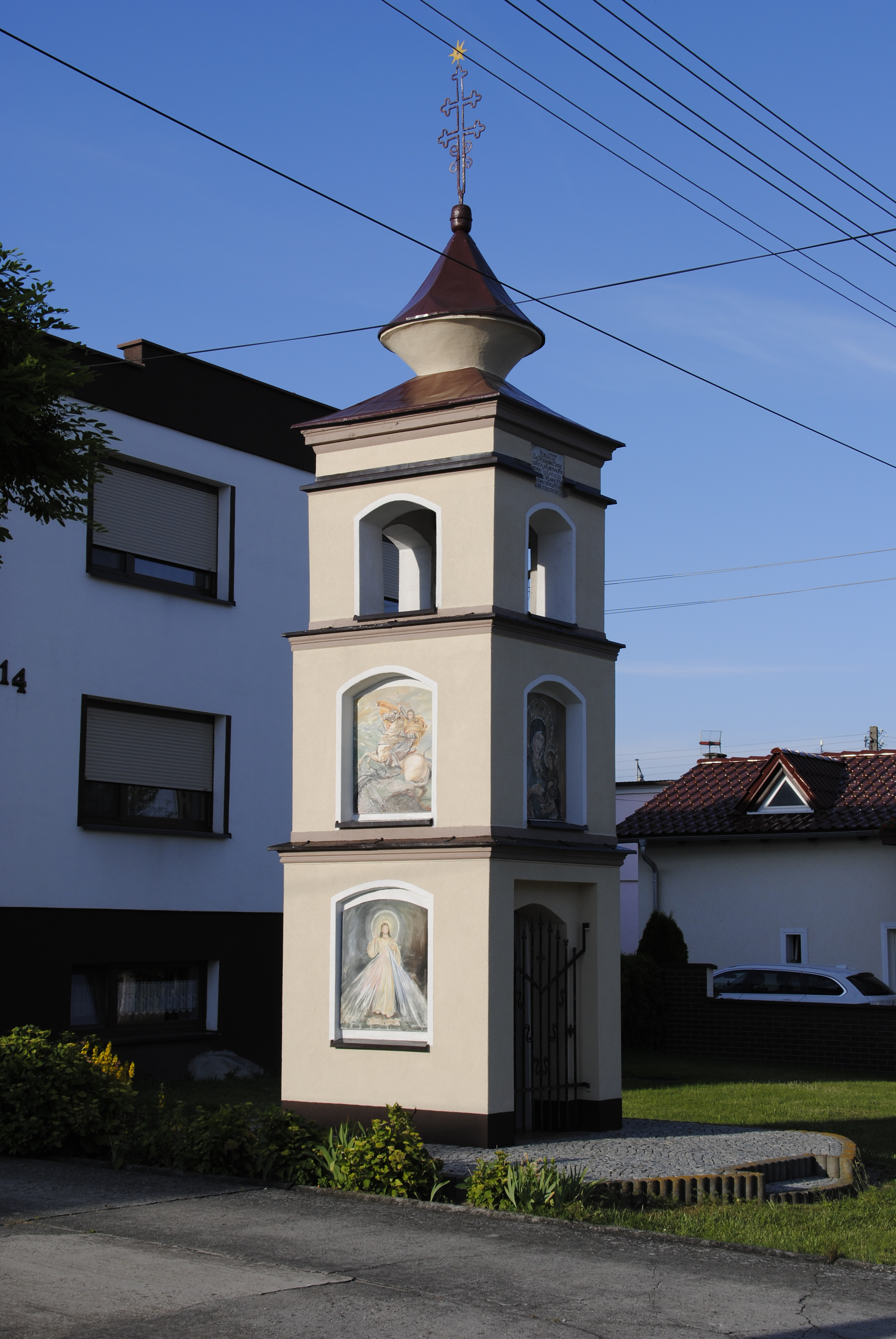 Kapelle in Zlönitz in der ul. Jędrzejczyka